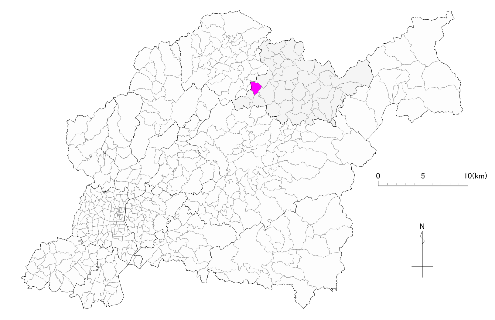 豊田市笹戸町位置図